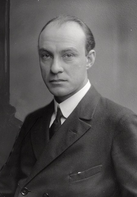 Tor Helge Kjellin